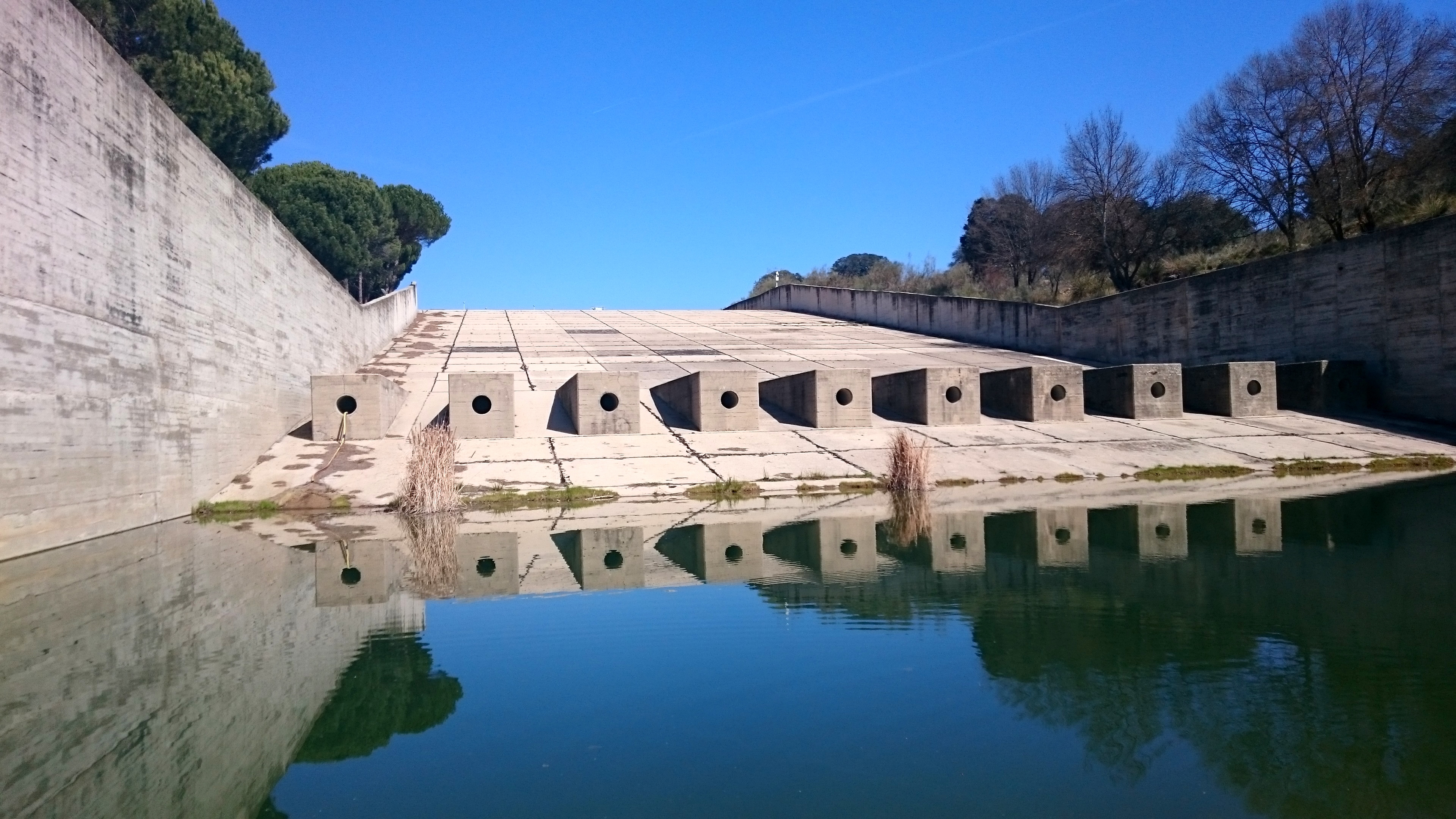 Aliviadero del embalse de El Pardo This is a photography of a Special Area of Conservation in Spain with the ID: ES3110004. Natura2000 entry, EEA entry